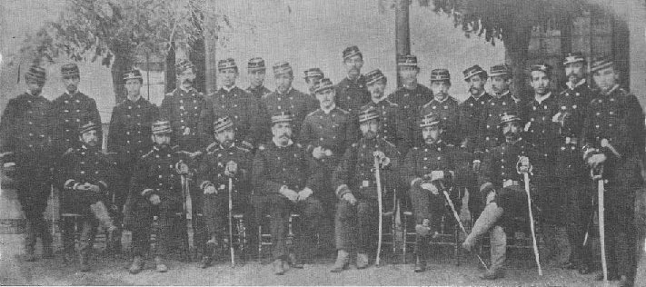 OFICIALIDAD DEL BATALLON TALCA De pie, segunda fila, de izquierda a derecha: Alberto Chaparro, teniente; Manuel Antonio Sepúlveda, subteniente; Carlos Fernández Letelier, subteniente; N. Torres, subteniente; José Domingo Urzúa, teniente; Francisco Wormald Valenzuela, subteniente; Alejandro Concha, teniente; Clodomiro Pradel, teniente; Anatolio Valdivieso, teniente; Rudecindo Concha, subteniente; Armando Vergara, subteniente; Valentín Cruzat, subteniente; Agustín Donoso, subteniente; Rogelio Azócar, subteniente; Luis Felipe Novoa, subteniente; Ruperto Donoso, subteniente; N. Alvarez, subteniente y José Ignacio Concha, teniente. Sentados, de izquierda a derecha: Dionisio San Cristóbal, capitán; Eliodoro Vergara, Capitán; Alejandro Cruz Vergara, capitán; Carlos Silva Renard, mayor, 2º comandante; Ramón Villalobos, capitán; Manuel Fernando Parot, capitán y Eneas Fernández Letelier, capitán. Fuente: Historia de Talca, Gustavo Opazo Maturana.